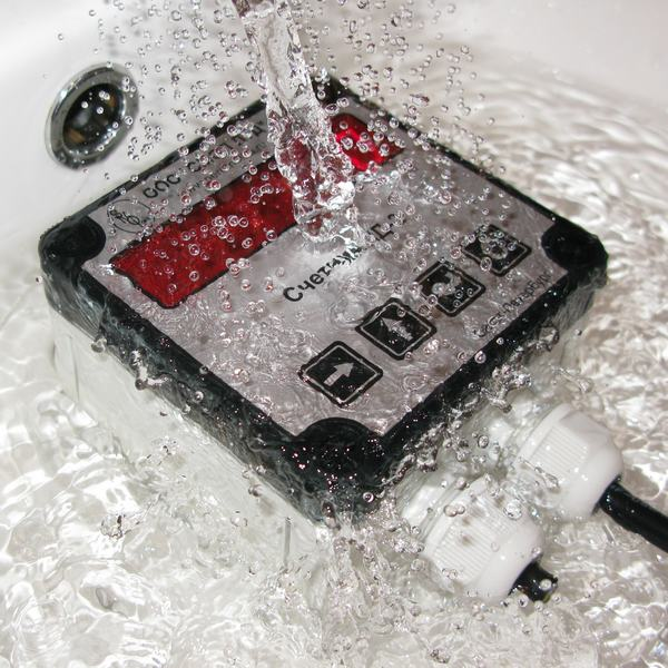 Герметичный счетчик импульсов ИД-2 в воде, производитель ООО "Смол", Санкт-Петербург